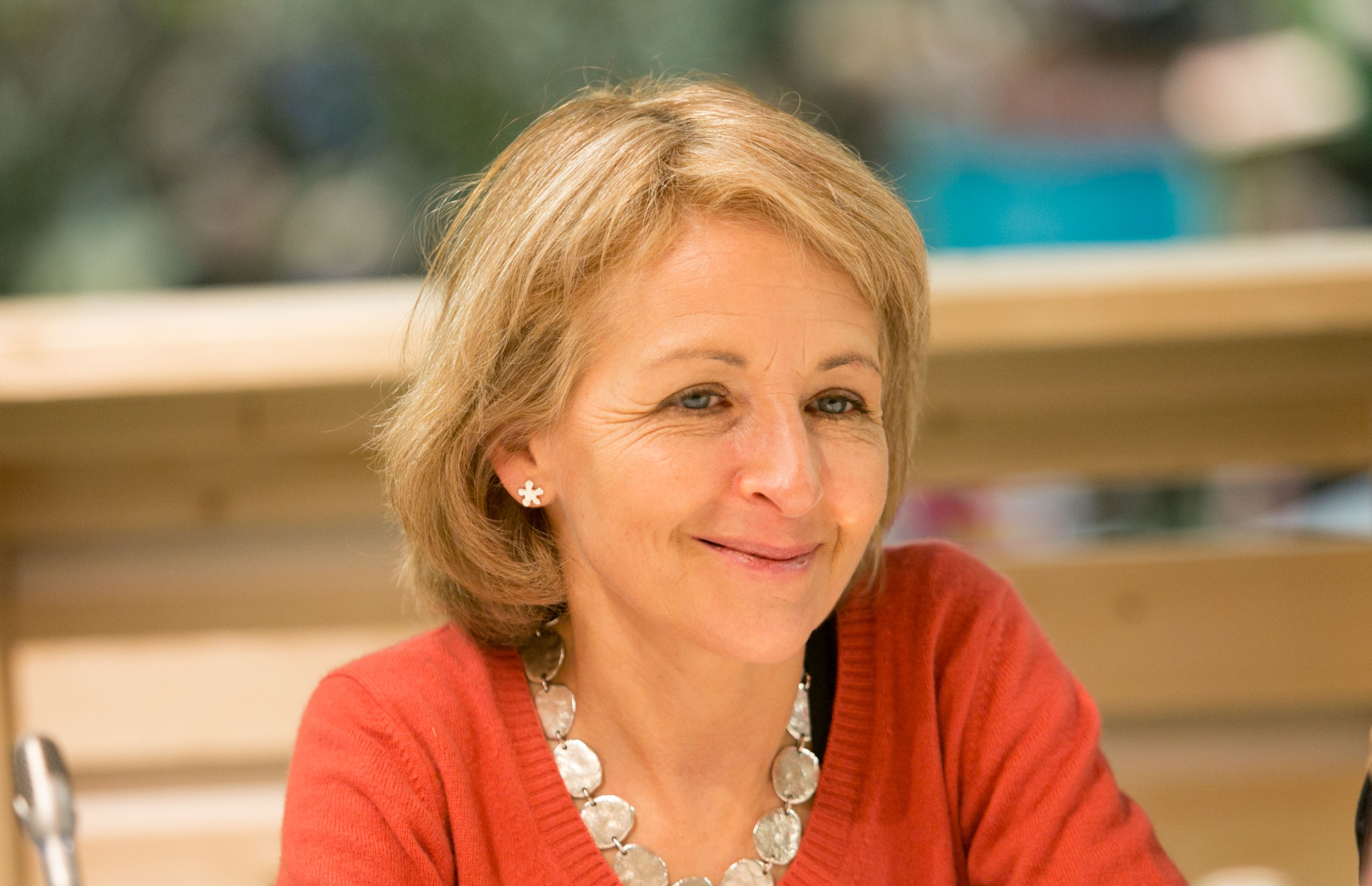 Laure de La Raudière, député d'Eure-et-Loir le 24 Février 2015